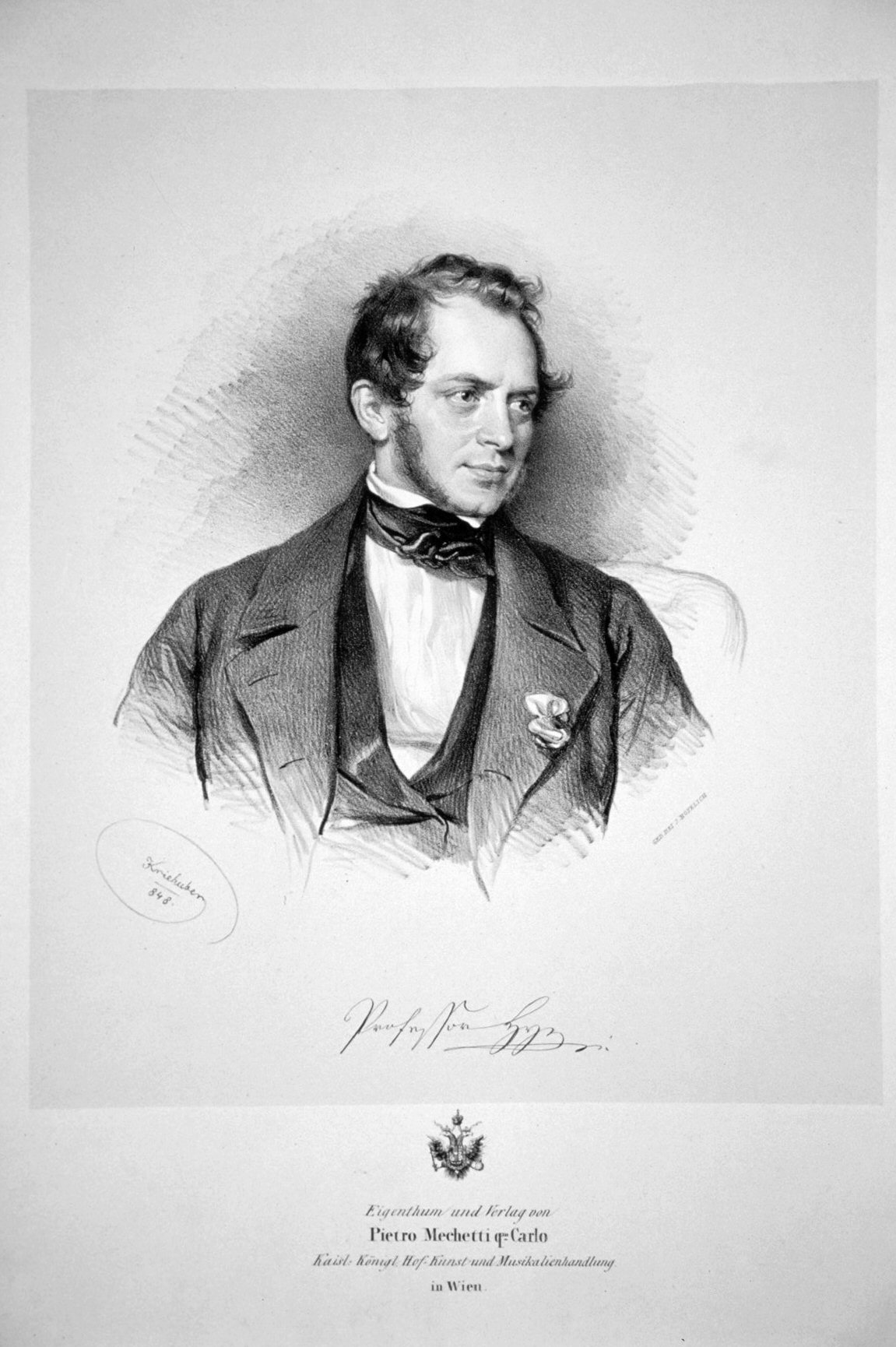 Prof. Anton Hye von Glunek, Lithographie von Josef Kriehuber, 1848